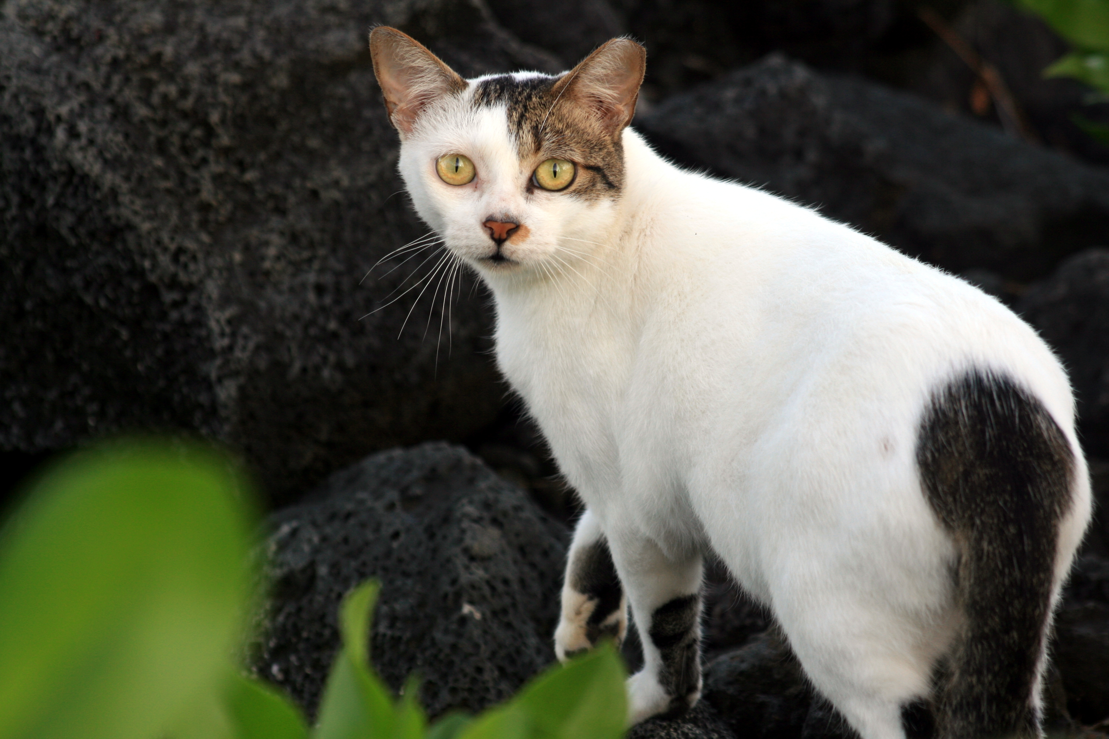 Feral Cat